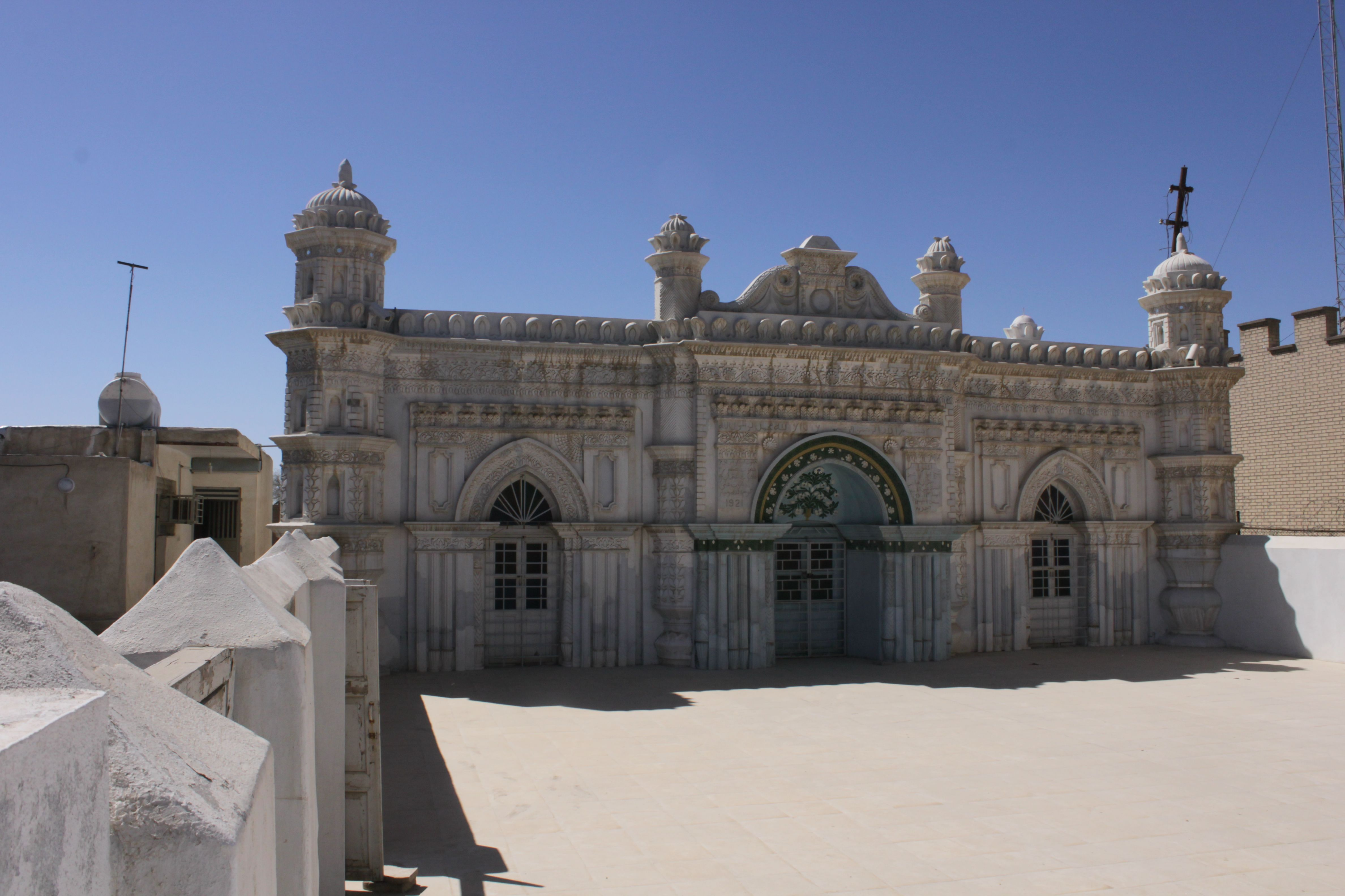 مسجد رانگونی‌های‌آبادان/ کلوپ هن